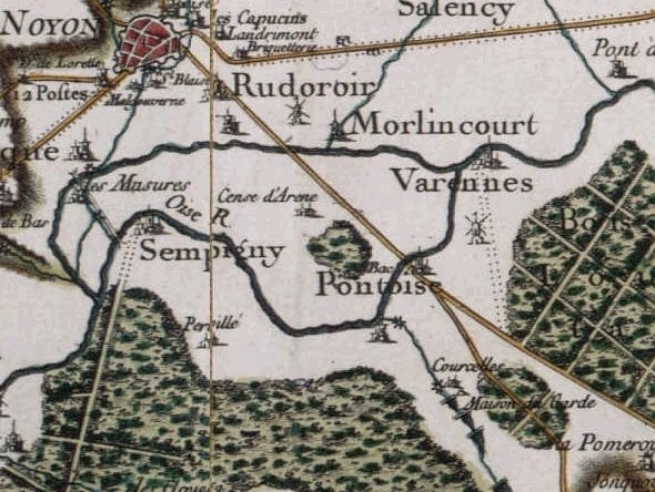 Carte de Casssini